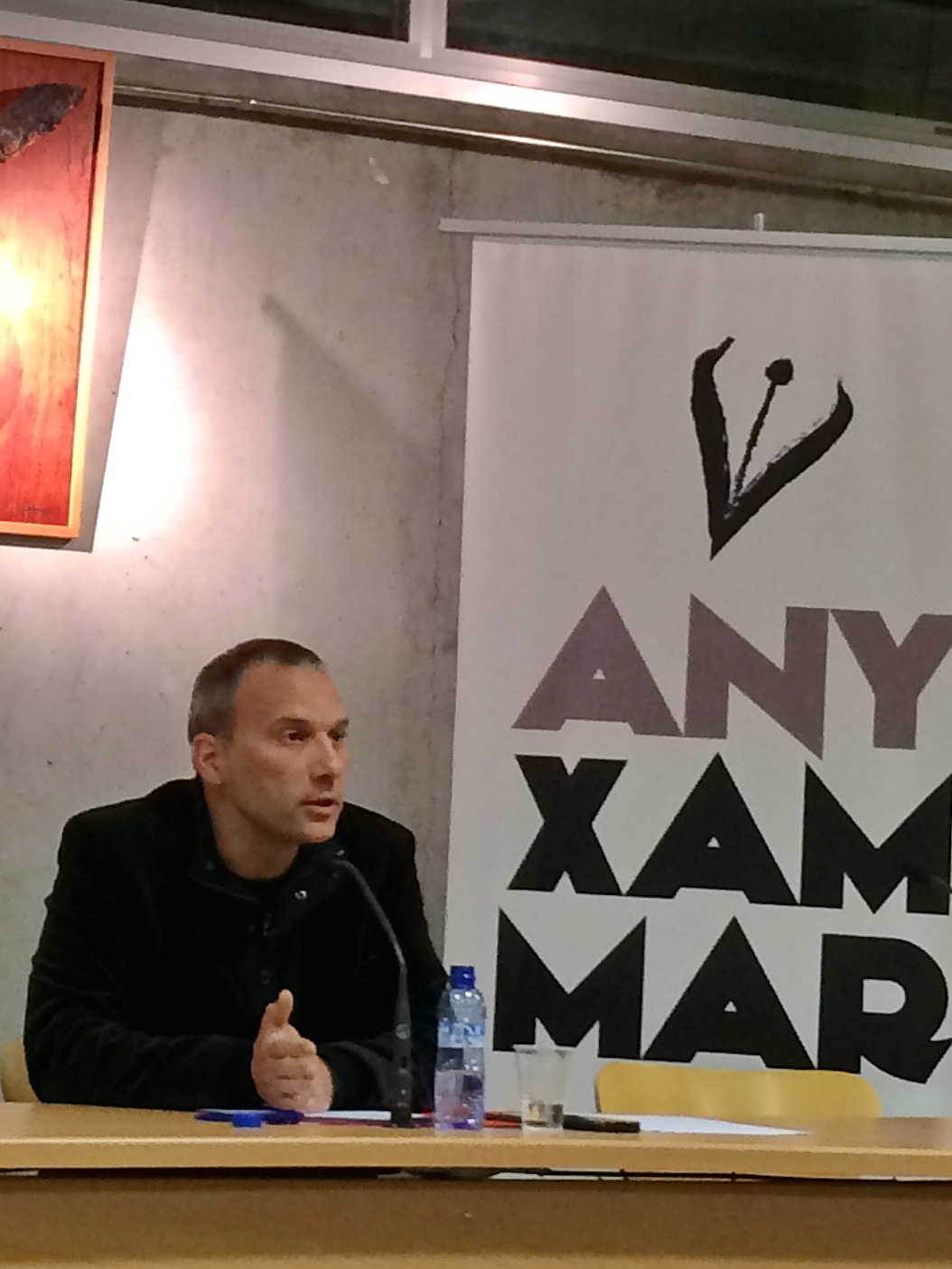 David Bassa i Cabanas (Granollers, 1971) és un periodista i escriptor català, president del Grup de Periodistes Ramon Barnils. Foto realitzada durant una conferència de l'Any Xammar a l'Ametlla del Vallès.